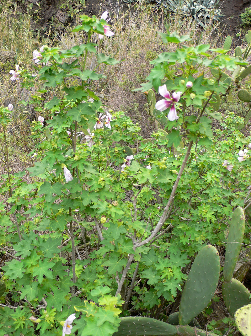 Malva canariensis. Malva de Risco. Barranco de Masca en el Parque Natural de Teno (Tenerife)